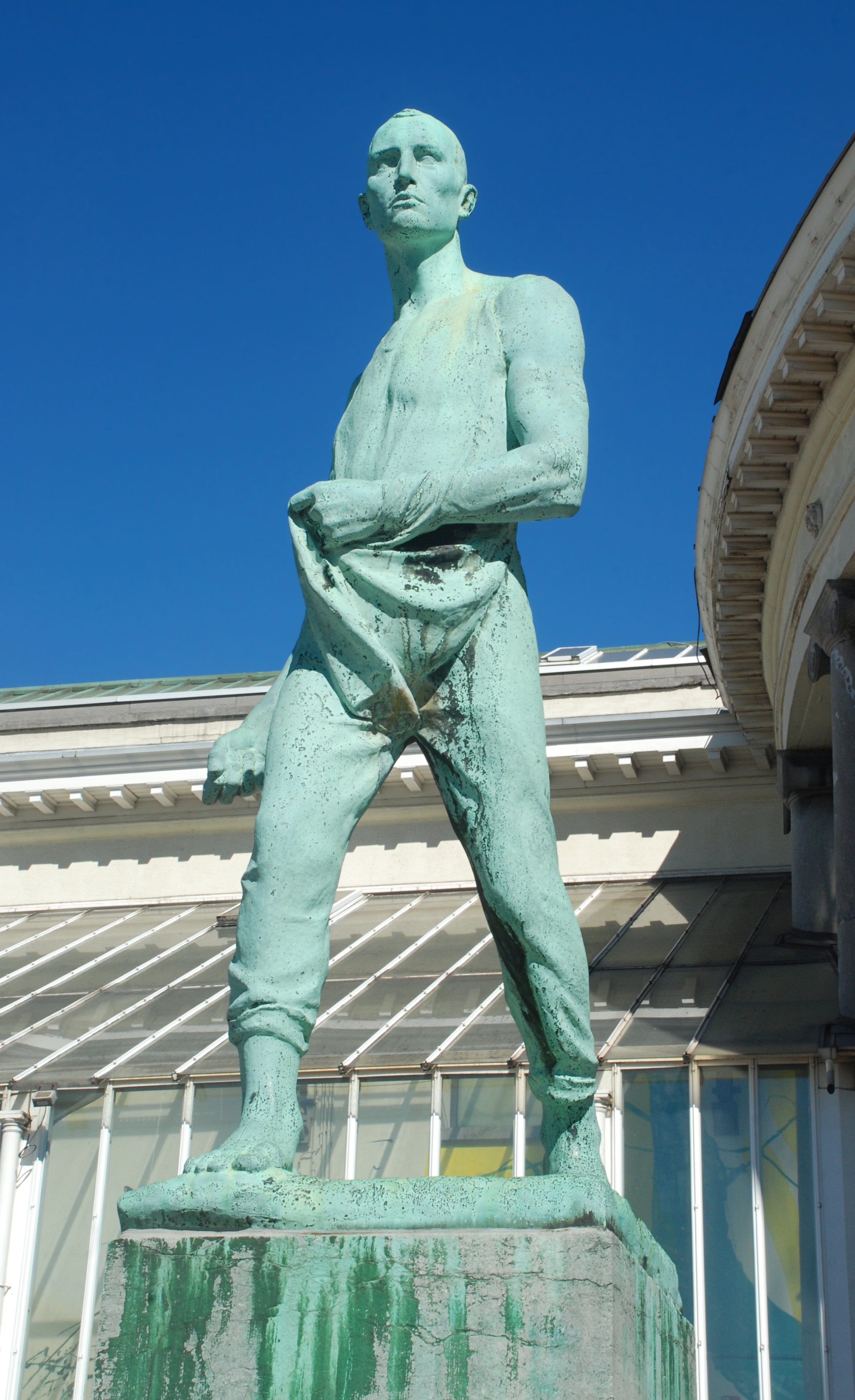 Belgique - Bruxelles - Jardin botanique de Bruxelles - L'Automne ou Le Semeur de Constantin Meunier This photo of immovable heritage has been taken in the Brussels Capital Region